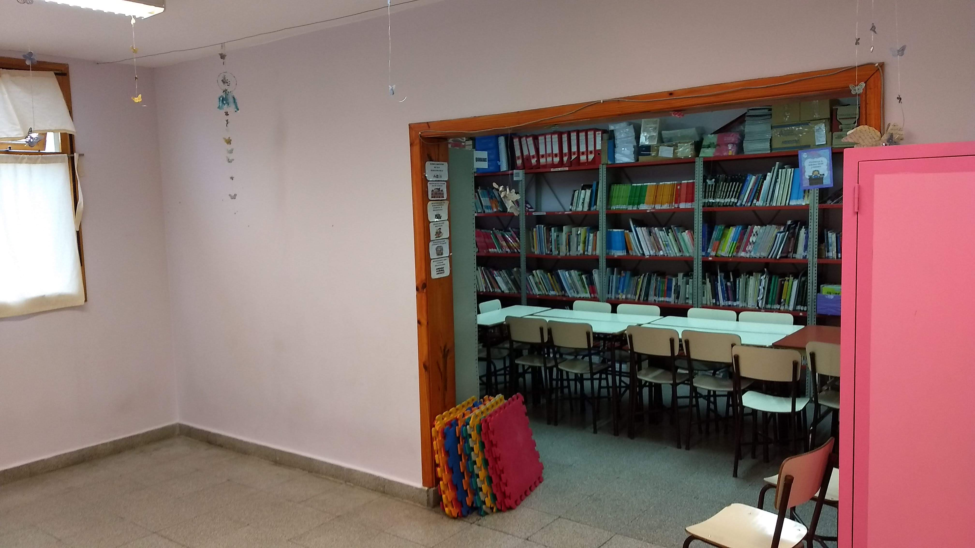 La biblioteca escolar "El mundo de los libros" se encuentra inserta en la Escuela Provincial n° 8 "Gral. José de San Martín", nivel primario, en la ciudad de Río Grande. Se asiste a una población de más de 600 usuarios (estudiantes, docentes, familias).